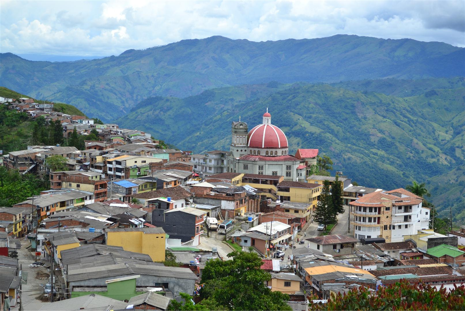 Municipio de Valdivia, Colombia